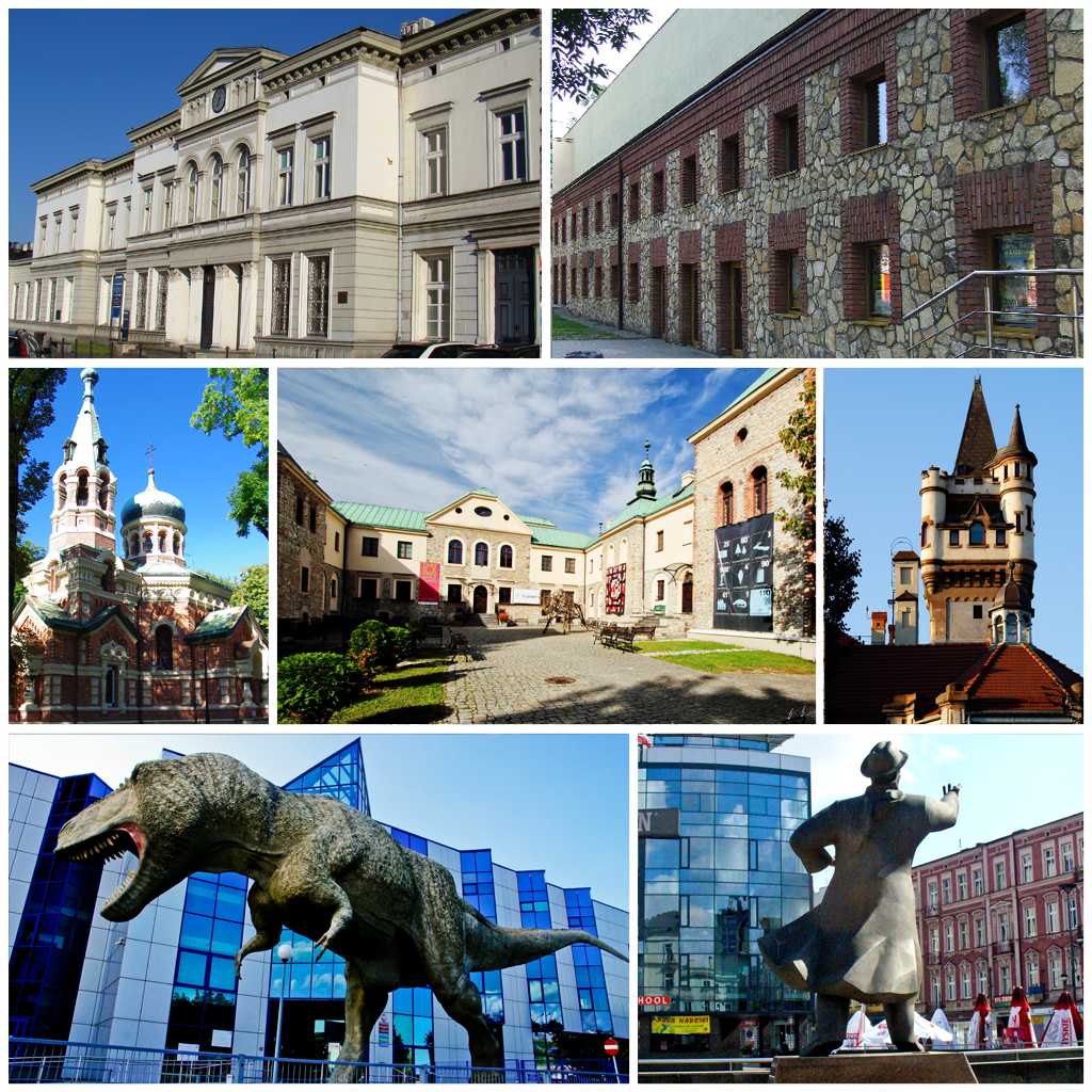 Kolaż (kolejno od góry od lewej): Sosnowiec Główny, Kino Helios, Cerkiew, Zamek Sielecki, Pałac Oskara Schona, Muzeum Geologii, Pomnik Jana Kiepury i Plac Stulecia